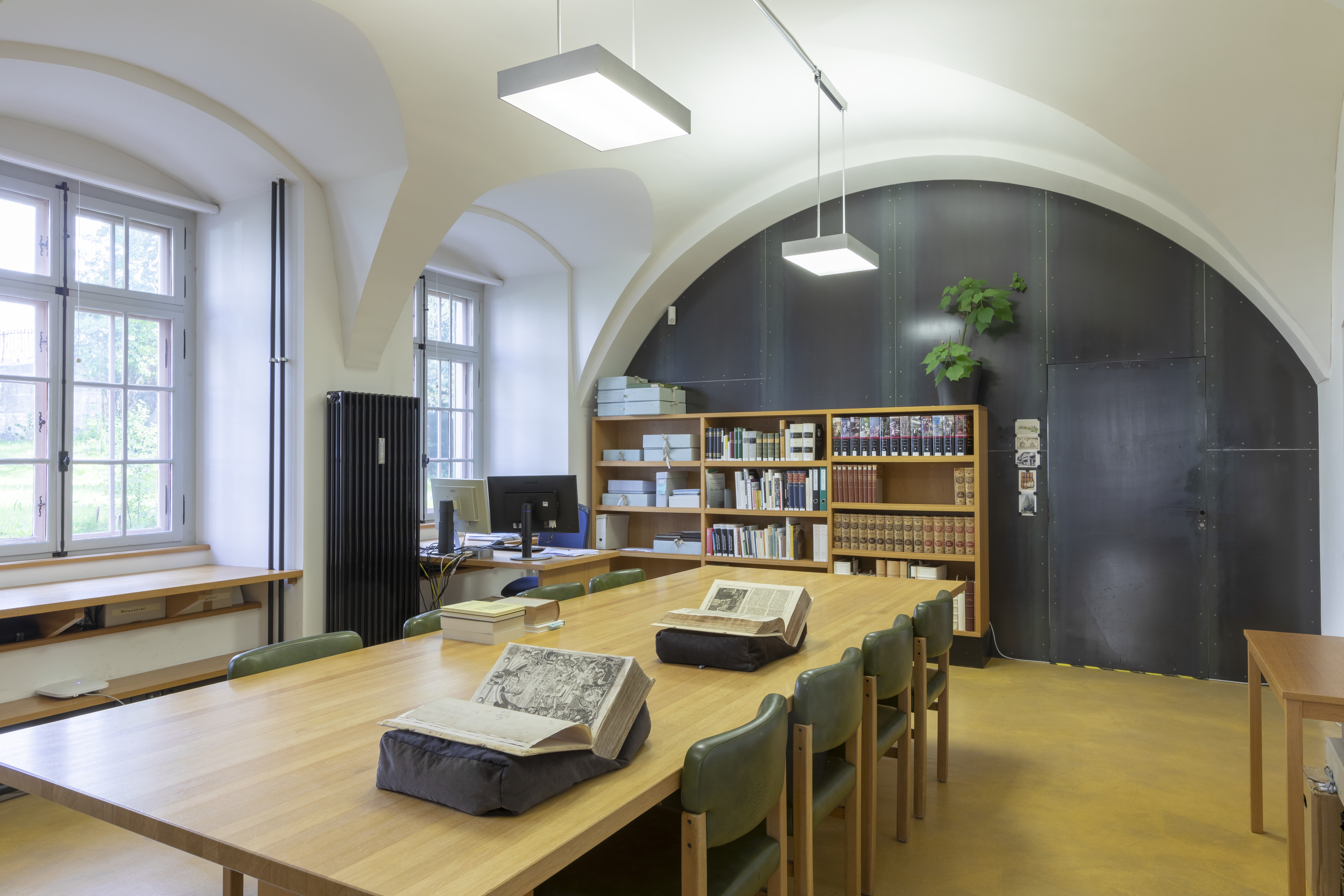 Lesesaal der Kantonsbibliothek Appenzell Ausserrhoden im Sockelgeschoss des Fünfeckpalasts am Landsgemeindeplatz 7 in Trogen